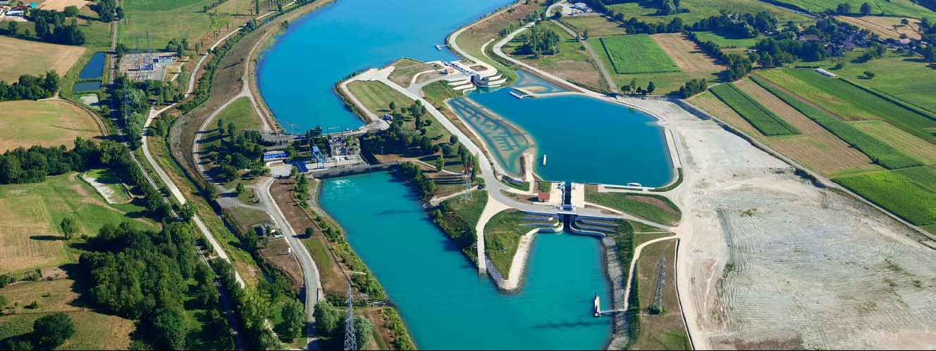 L'écluse de Brens/Virignin